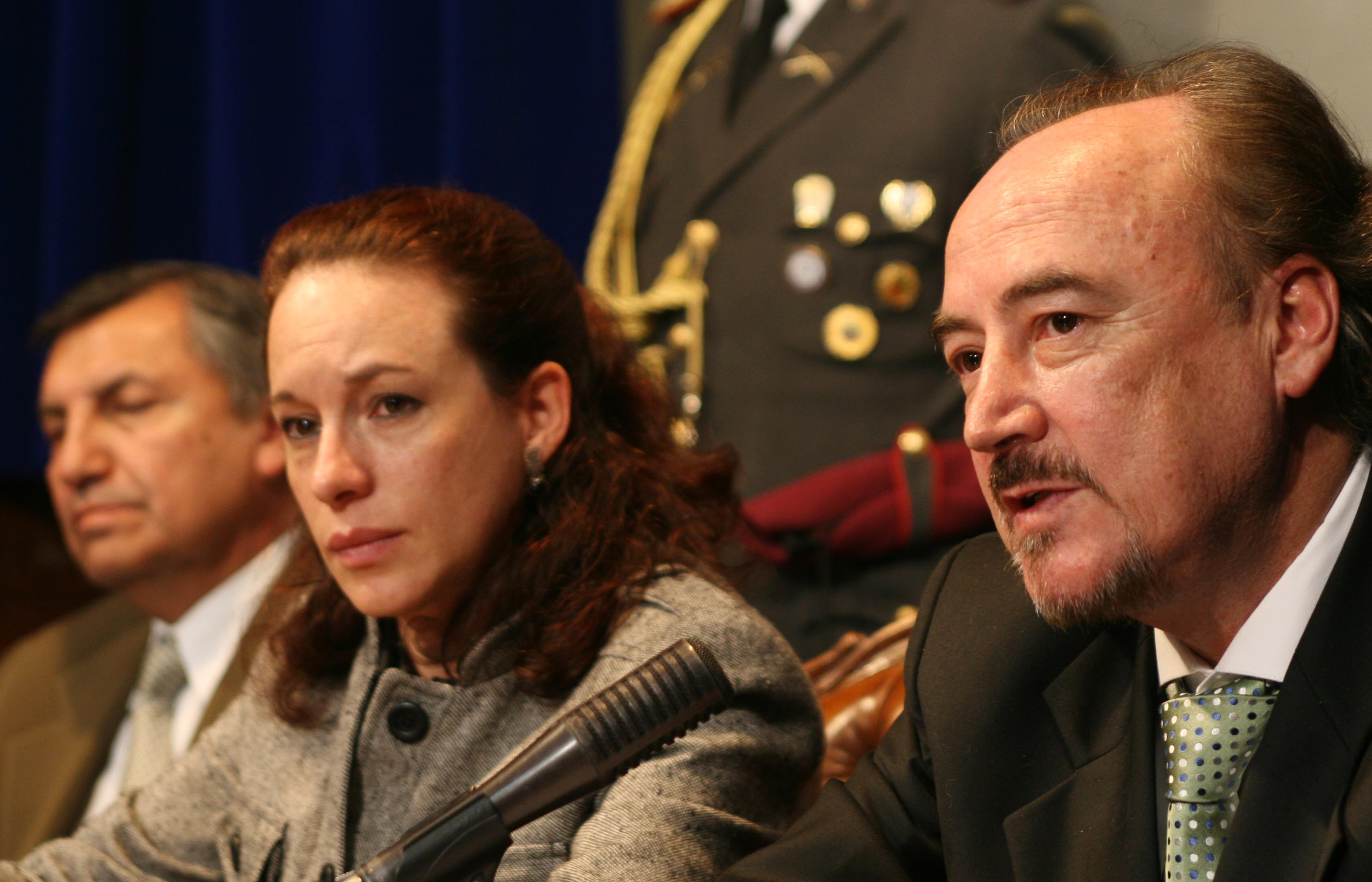 La canciller de la republica maria fernanda espinosa junto al ministro de gobierno gustavo larrea y al ministro de defensa wellington sandoval brindaron una rueda de prensa en el salon azul de la presidencia para informar sobre la situacion de los desplazados colombianos. Quito 10 de octubre de 2007. Foto paul navarrete